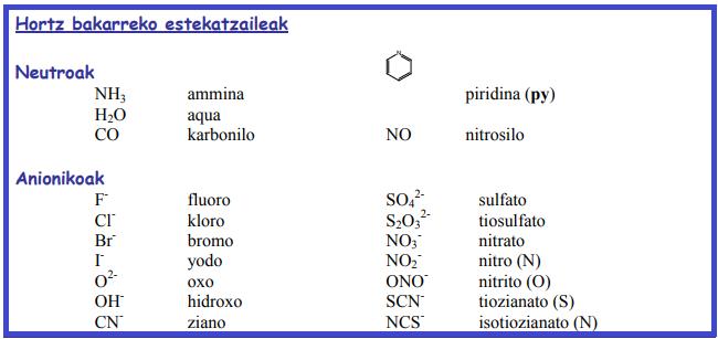 Hortz bakarreko estekatzaileak